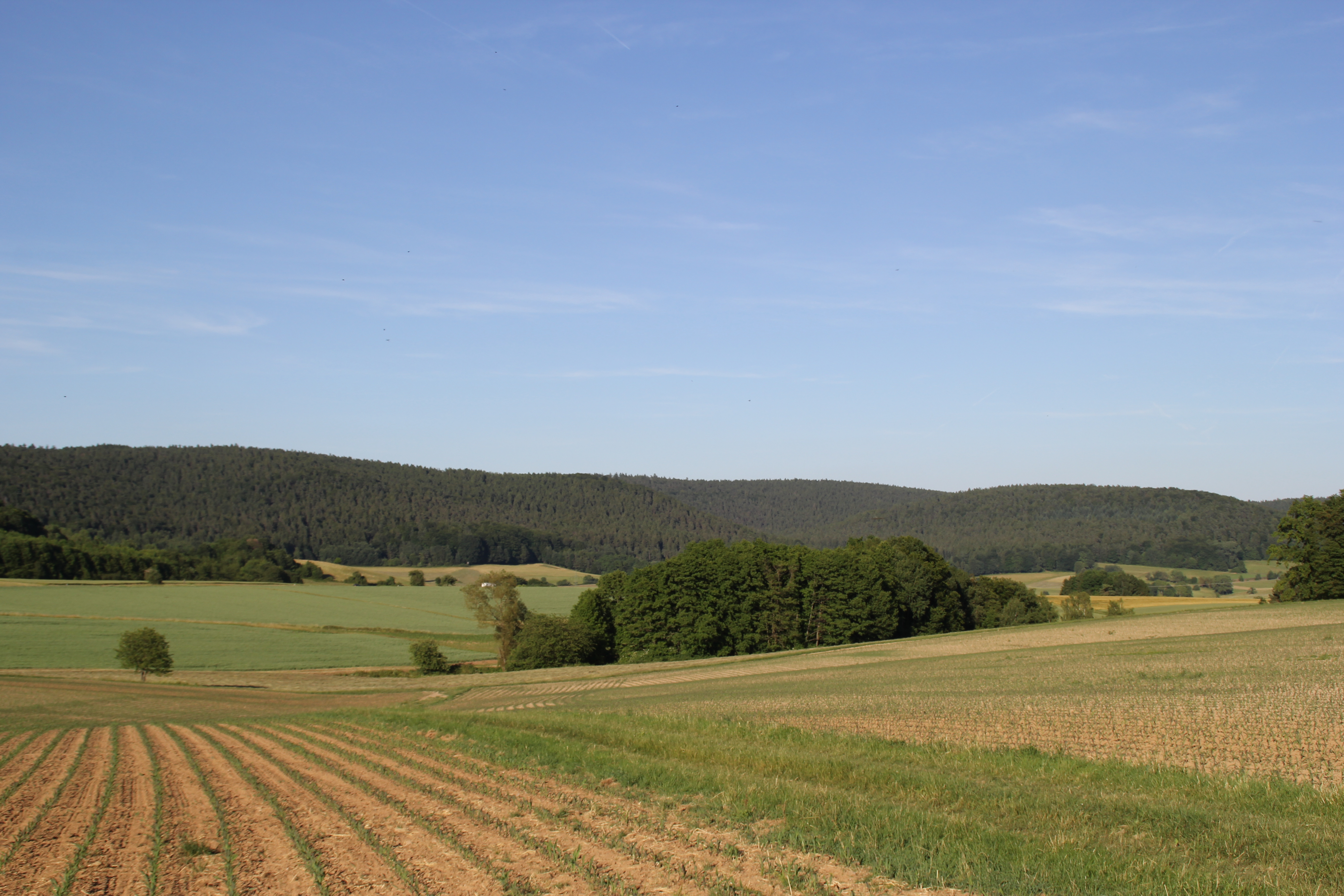 Blick in den Huckelheimer Wald von Geiselbach gesehen